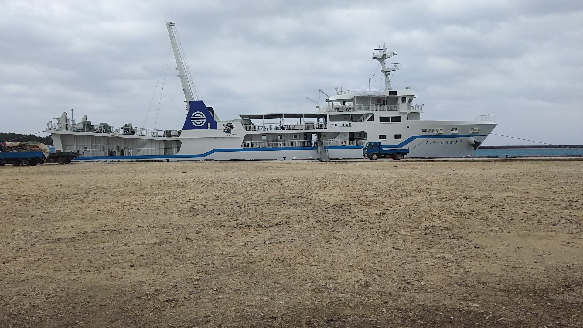 フェリーたらまゆうを多良間島普天間港より撮影